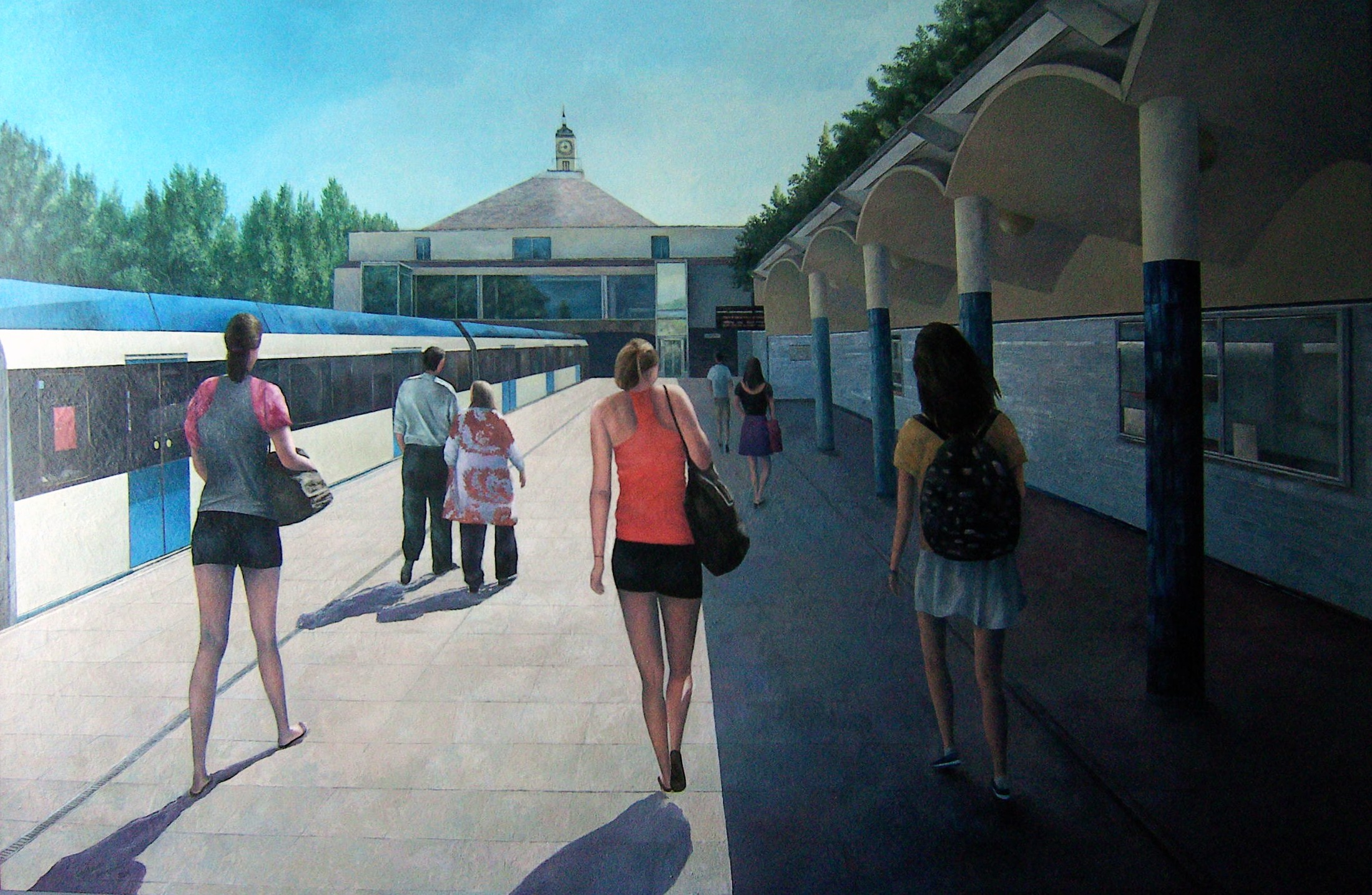 LA ESTACIÓN DE LAGO. Óleo-tabla, 150x100 cms. 2009